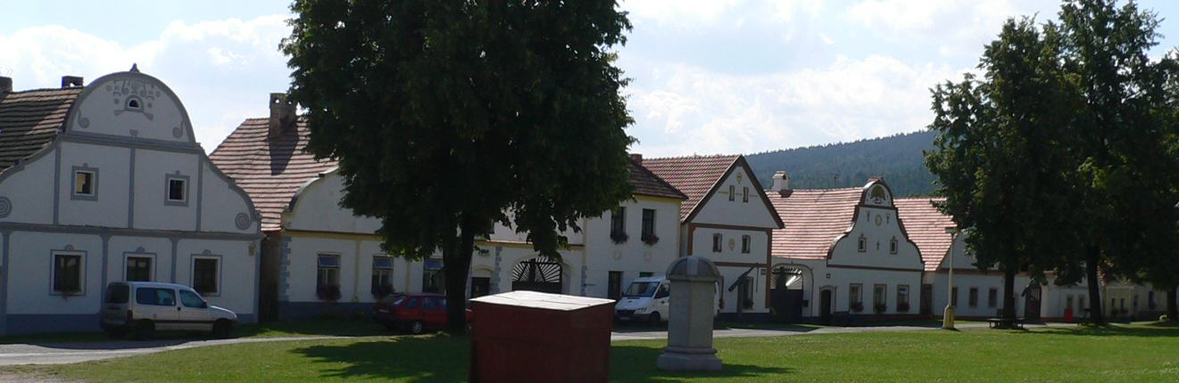 Historisches Dorf Holašovice (UNESCO Weltkulturerbe)